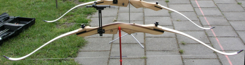 Een gespannen recurveboog met vizier, op de standaard eigen foto E van Herk 2005 GNU FDL